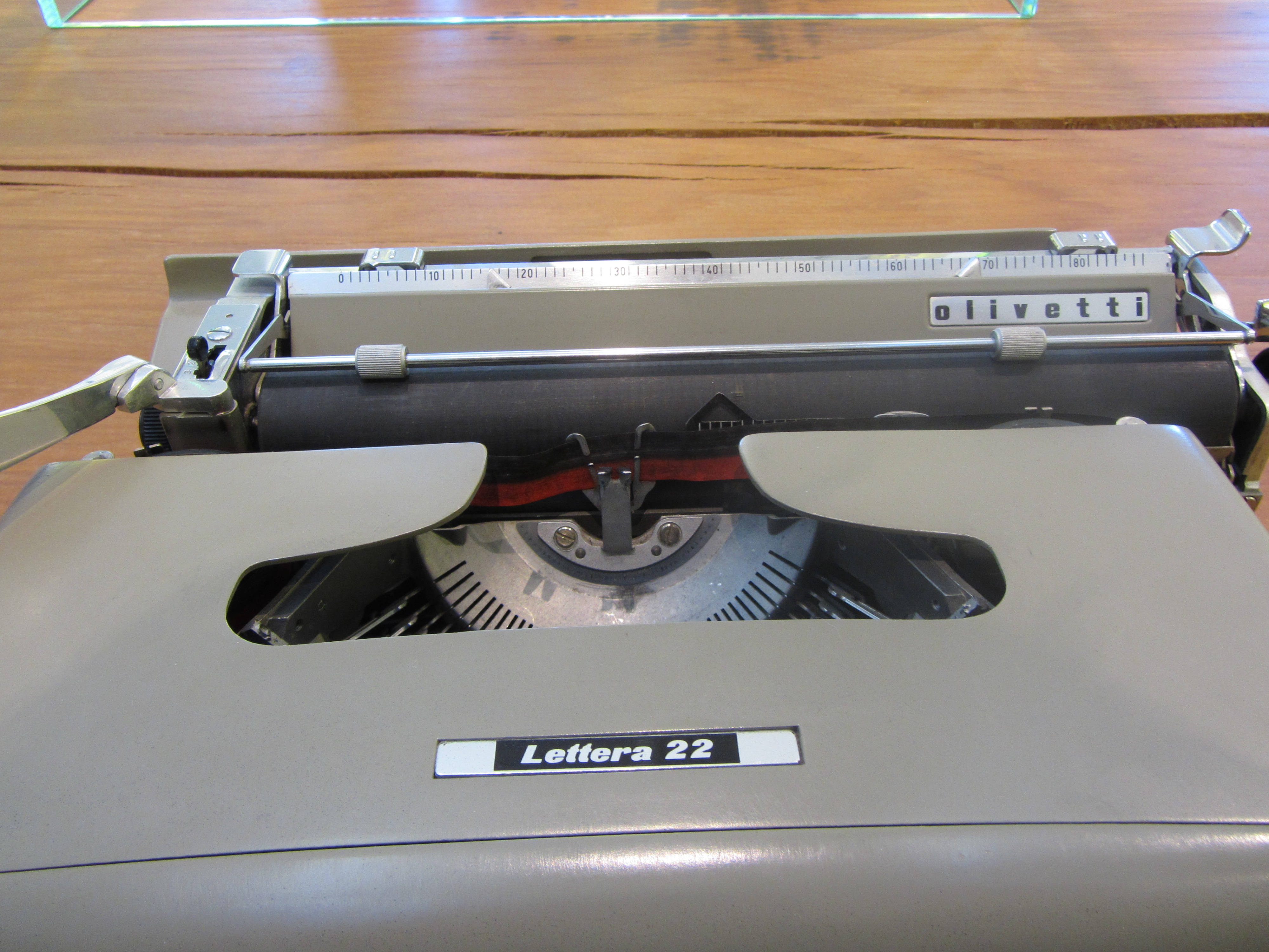 Particolare di una Lettera 22 Olivetti al Triennale Design Museum